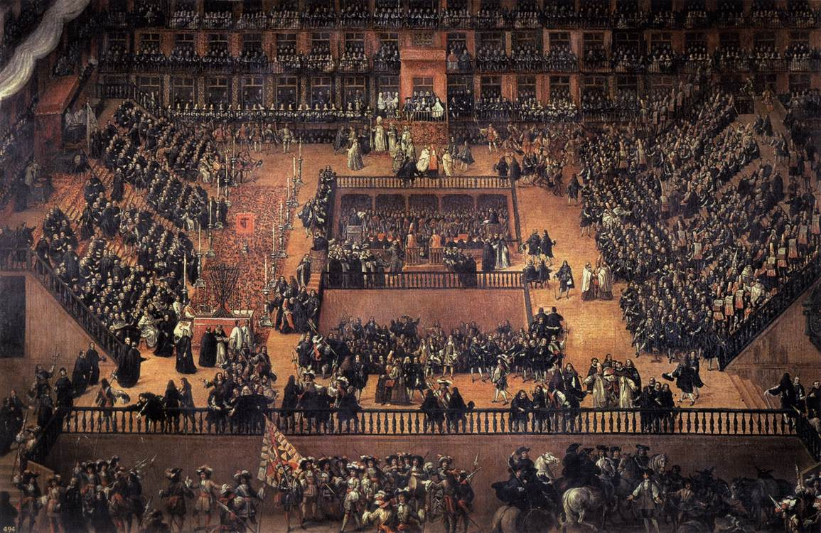 La obra representa un auto de fe celebrado en Madrid el día 30 de junio de 1680, durante el reinado de Carlos II de España. El auto se celebró en la plaza Mayor y duró toda una jornada. Al fondo vemos la tribuna real y en ella a Carlos II, a su mujer María Luisa y a su madre. En los balcones, se ubican personas distinguidas de la corte. A la izquierda, rica alfombra y sobre ella el altar con la cruz verde, simbolizando la esperanza de perdón de los reconciliados, y el estandarte del Santo Oficio. Al lado, las gradas de los cargos públicos, y el solio del inquisidor general quien todavía está junto a la tribuna del rey después de haberle tomado juramento. En el centro del cuadro vemos a dos reos vestidos como en el siglo XV, con coroza y sambenitos con llamas, a los relatores o lectores de causas y sentencias en los púlpitos, y a unos dominicos con el predicador en el púlpito central. A la derecha están las gradas para los familiares de la Inquisición y los reos en persona o en estatua (muertos o huidos), la cual lleva una inscripción con sus delitos y una caja con sus huesos. Los reos podían ser penitenciados (castigados con diversas penas y que al abjurar de sus errores se convertían en reconciliados) o relajados (condenados a muerte en garrote, o en hoguera si eran reincidentes). En primer plano se ve a los soldados de la fe y los asnos que llevarán a los condenados a muerte a las afueras de la ciudad para ser ejecutados por la justicia secular. En este grupo de soldados en la parte inferior central del cuadro, encontramos una figura masculina que porta un tambor de grandes dimensiones muy utilizado en este tipo de ceremonias.